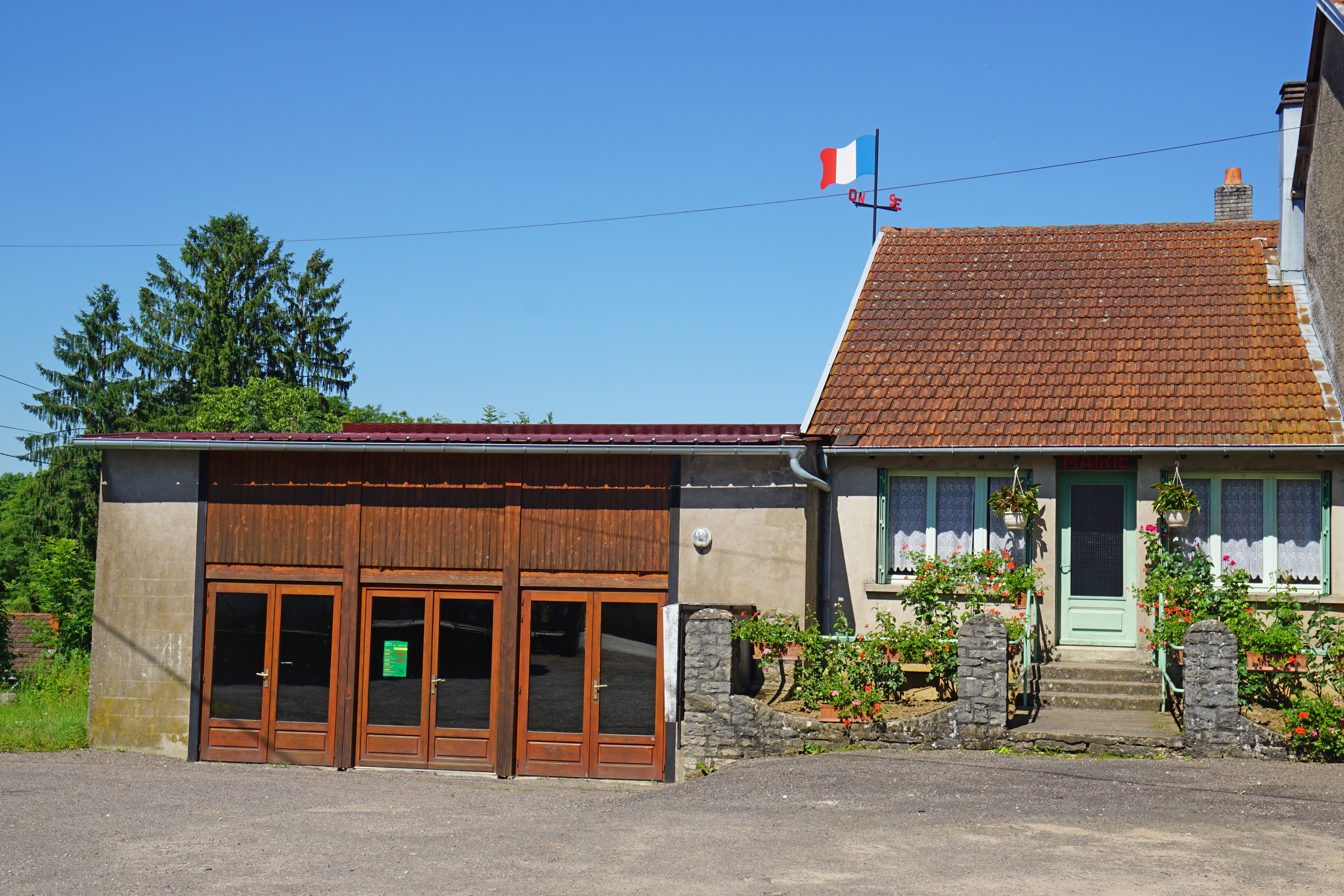 Mairie de Velleminfroy.